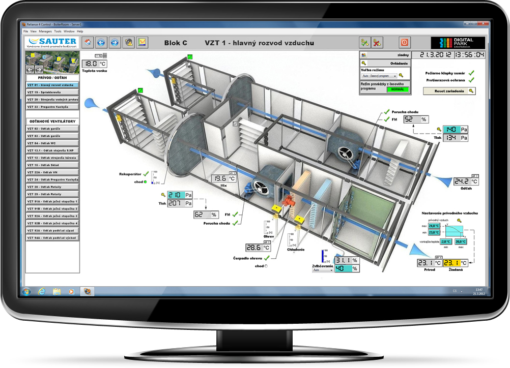 Reliance 4 Control - ukázka vizualizace vzduchotechniky